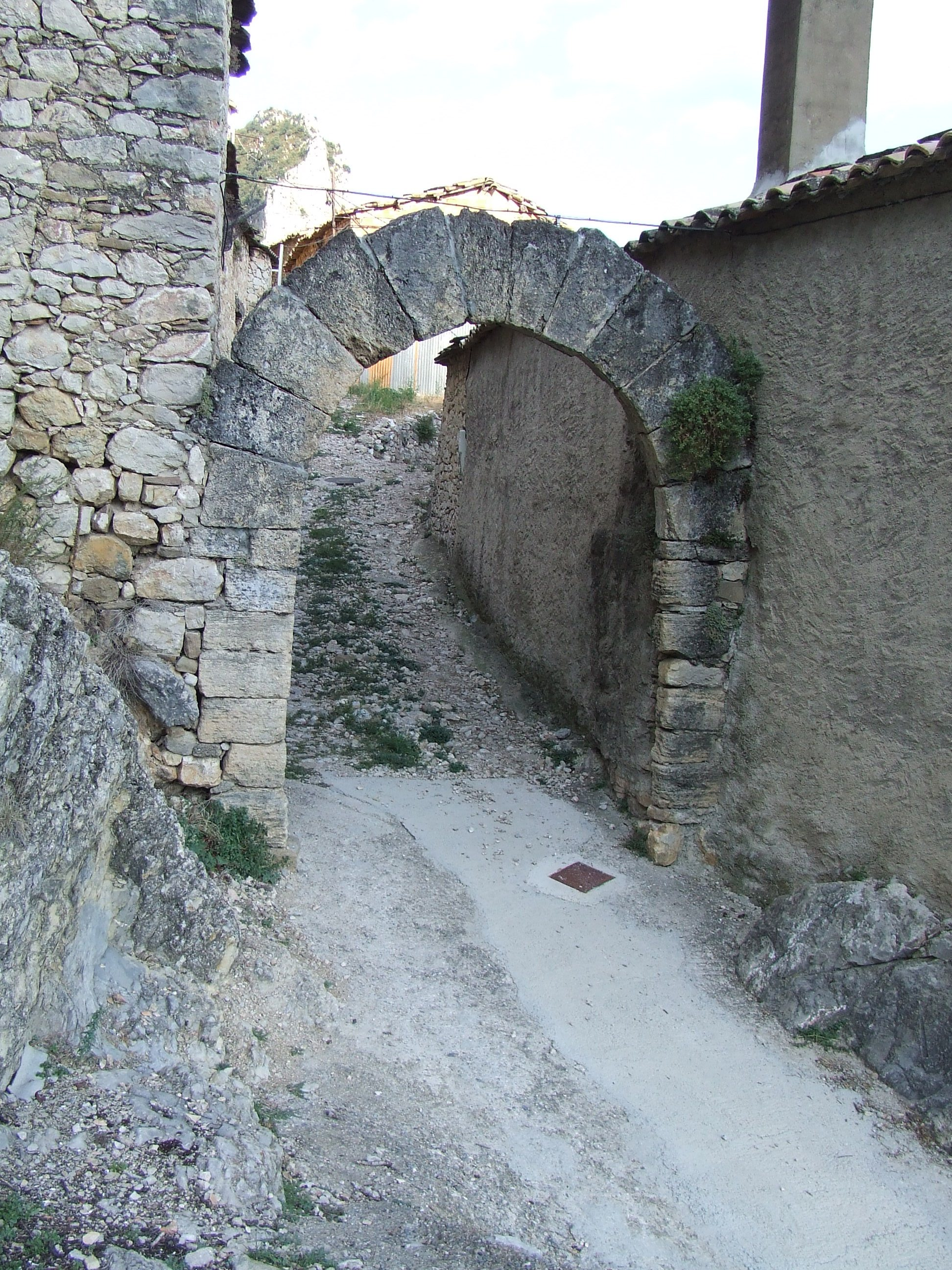 Portal d'Isona, de l'antic clos murat d'Abella de la Conca.